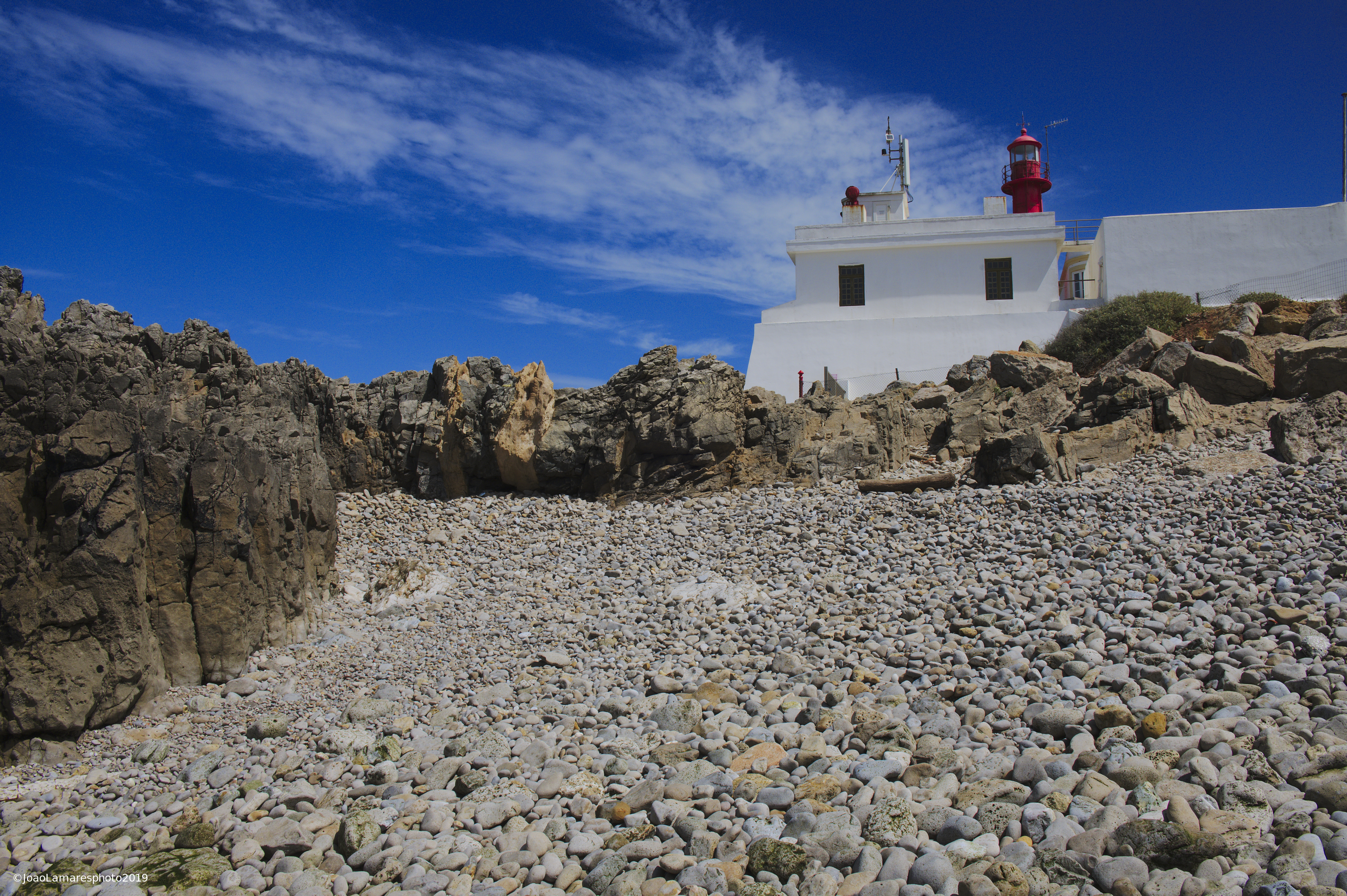 Ao lado do farol (esquerdo quem olha para o mar) encontra-se uma pequena praia de seixos que dá acesso ao mar. This is a photography of a protected area of Portugal indexed in the World Database on Protected Areas with the ID: 555623260 (WDPA)